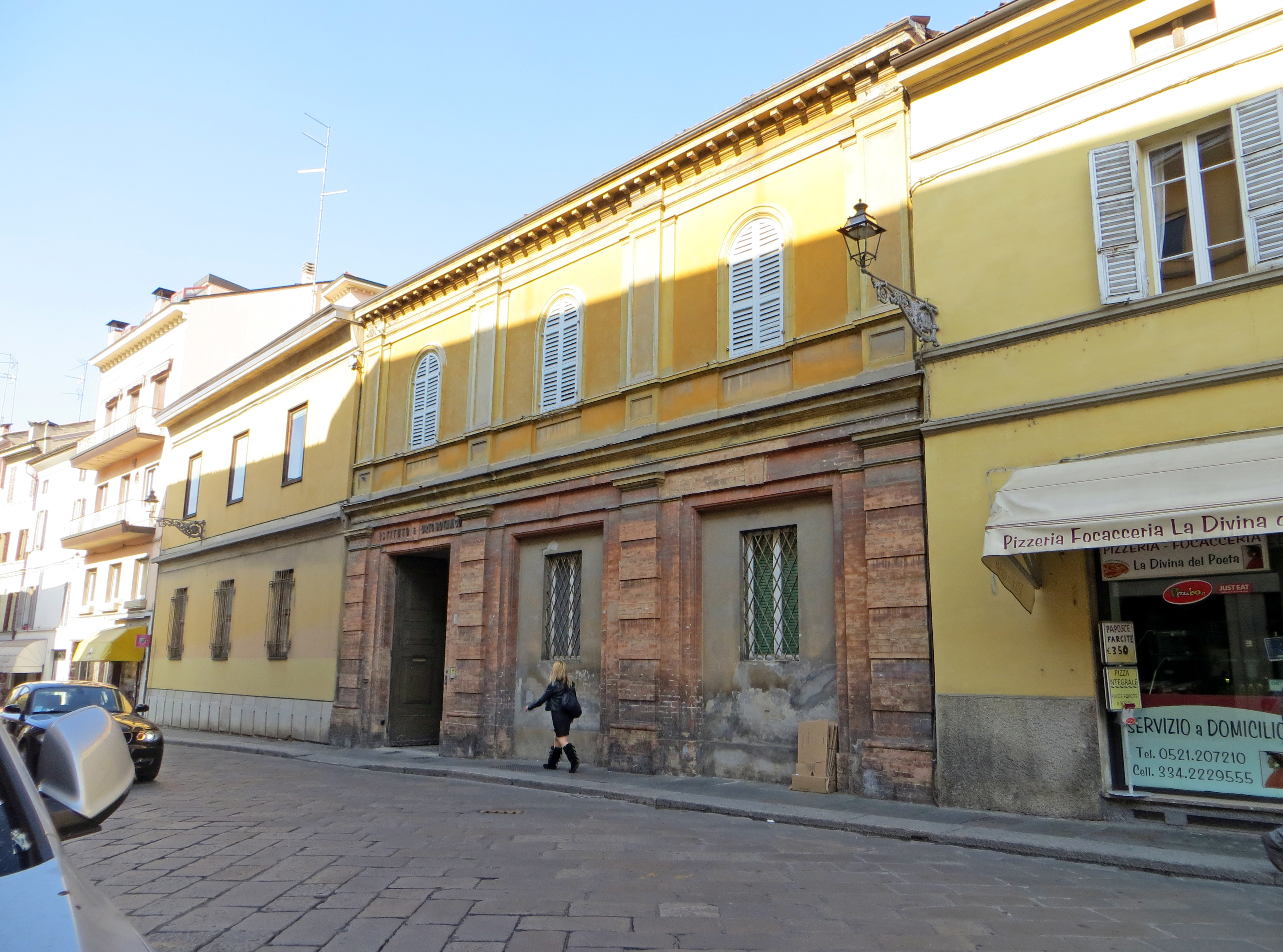 Orto botanico - facciata della palazzina d'ingresso